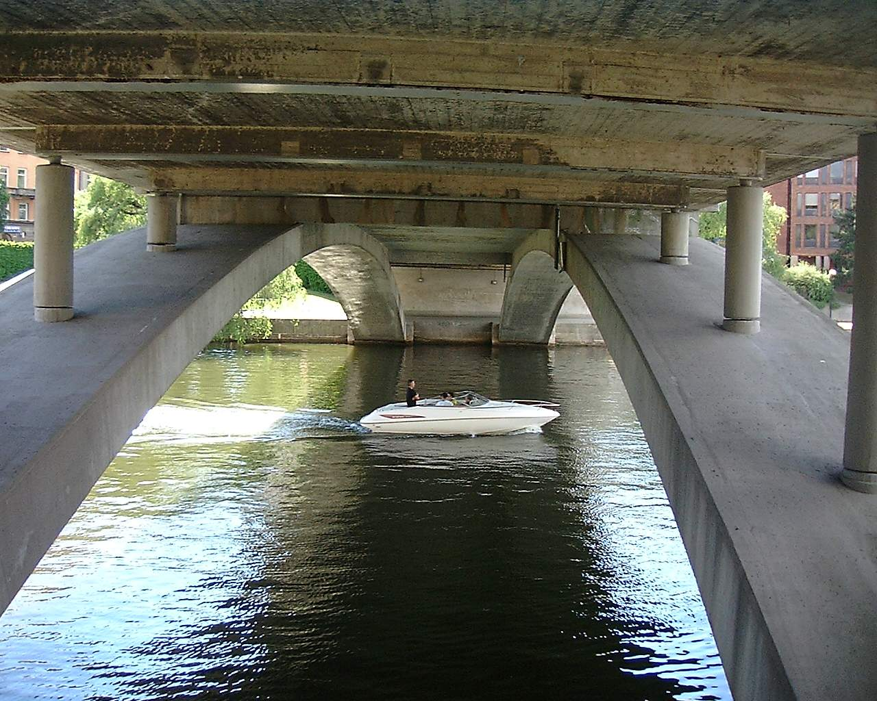 Kungsbron, Stockholm.